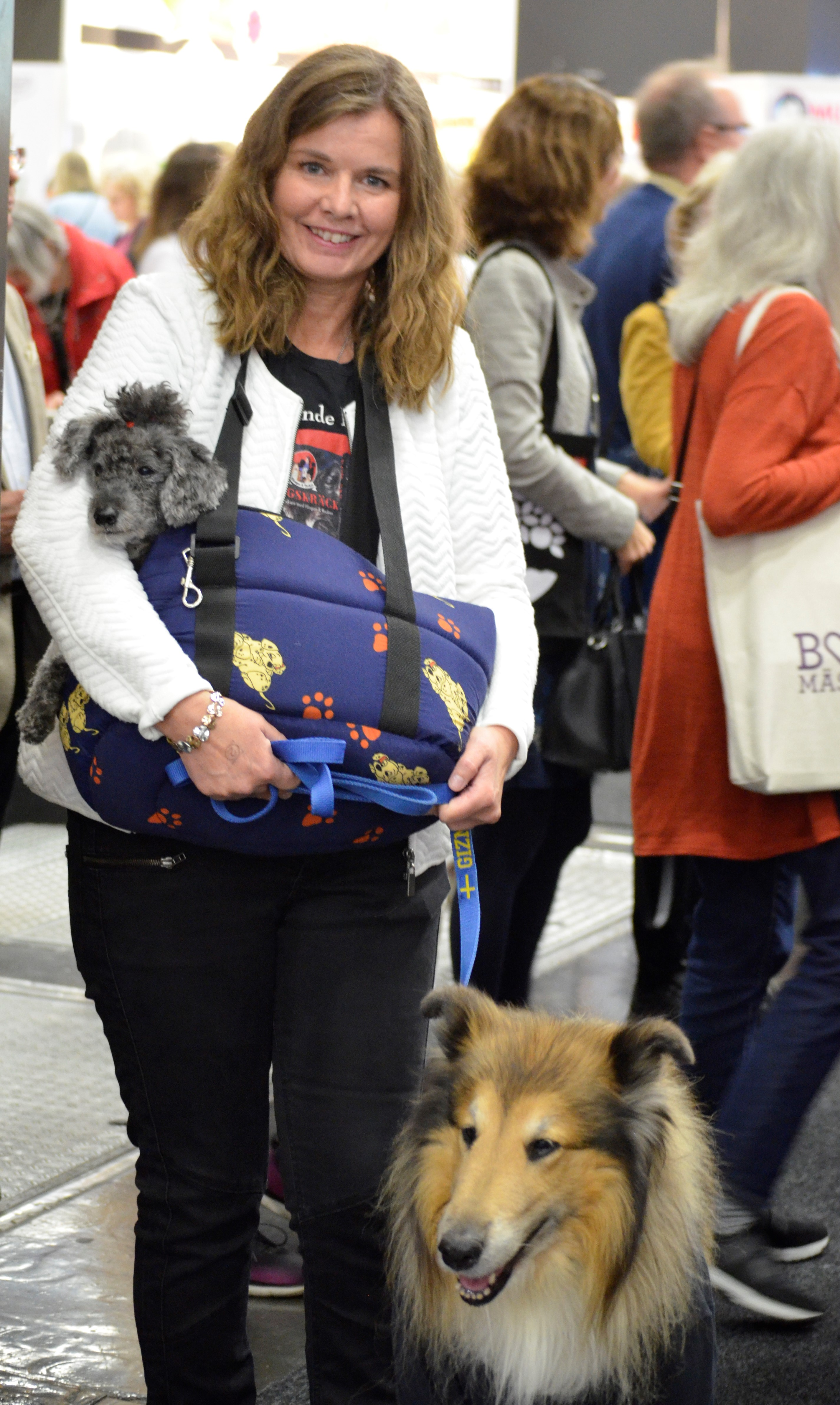 Jeanette Bergenstav Bokmässan Göteborg 2018